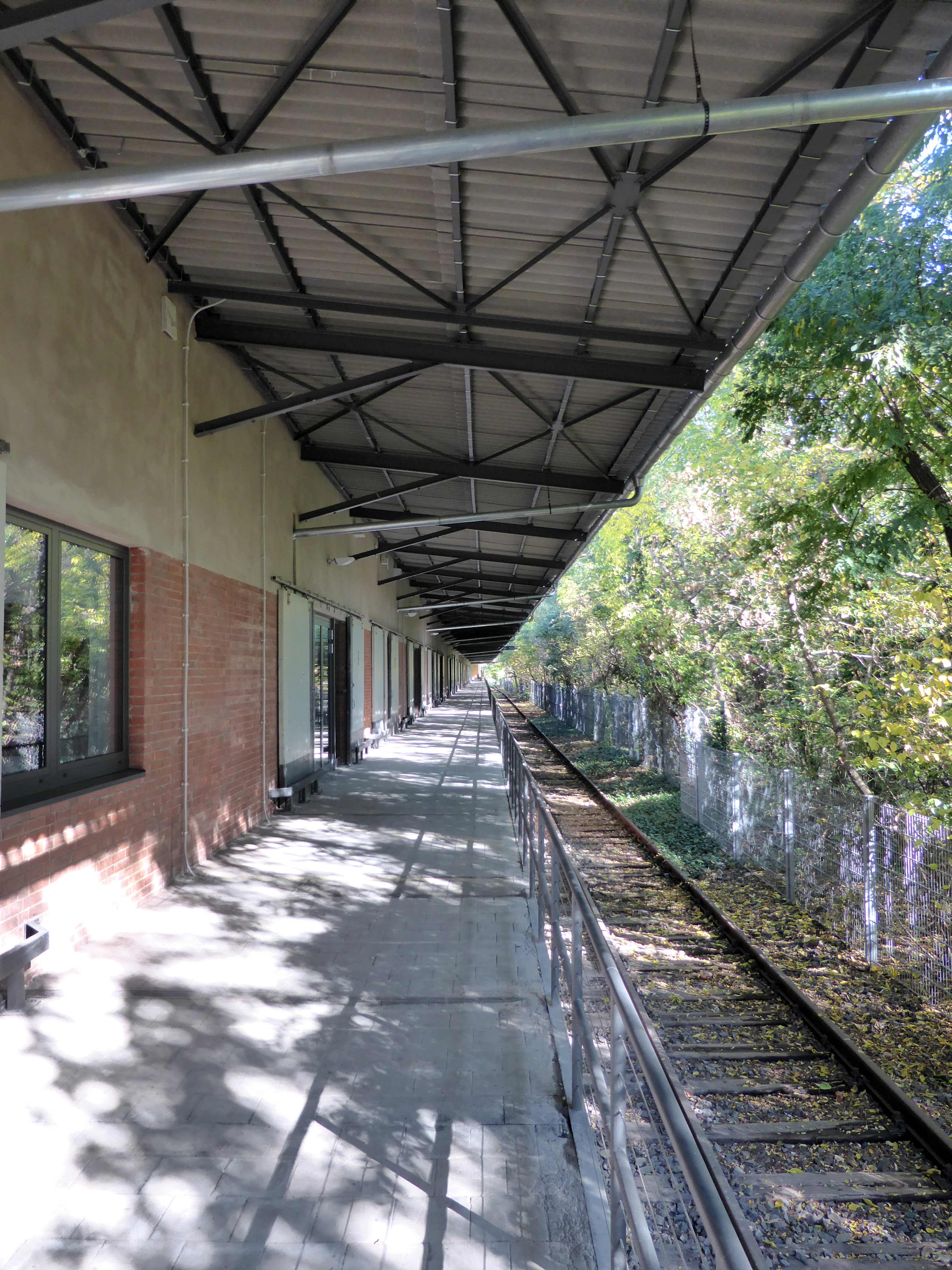 Verwaltungs- und Ausstellungsgebäude Anhalter Bahnhof. Deutsches Technikmuseum in Berlin. Wikipedianische KulTour am 10. Oktober 2015 in der Ausstellung des Museums.